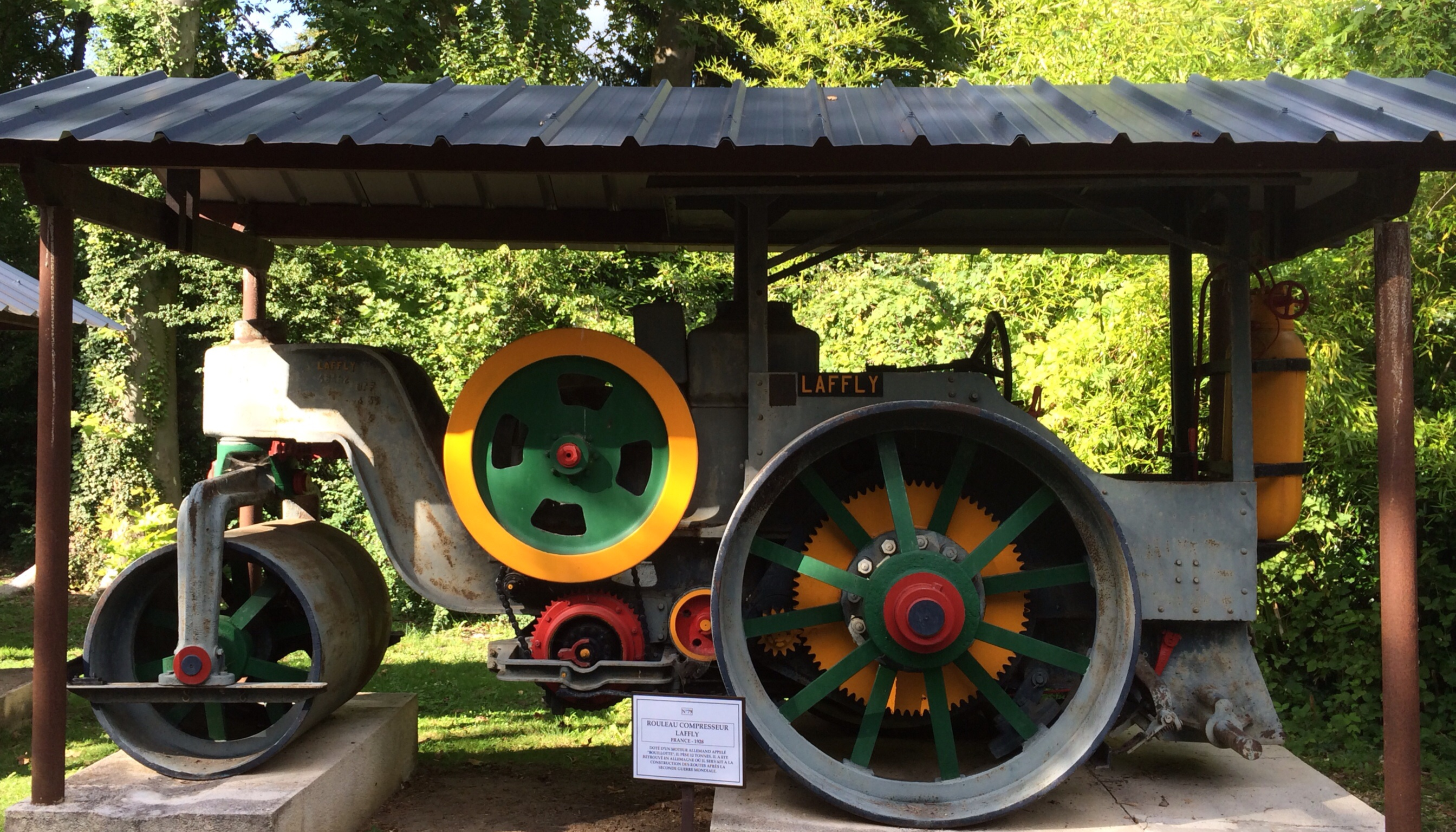 Rouleau compresseur Laffly, fabriqué en France en 1928. Il est doté d'un moteur allemand appelé "bouillote". Il pèse 12 t. Il a été retrouvé en Allemagne où il servait à reconstruire les routes après la seconde guerre mondiale. Il a été restauré par le musée et repeint avec les couleurs d'origine.